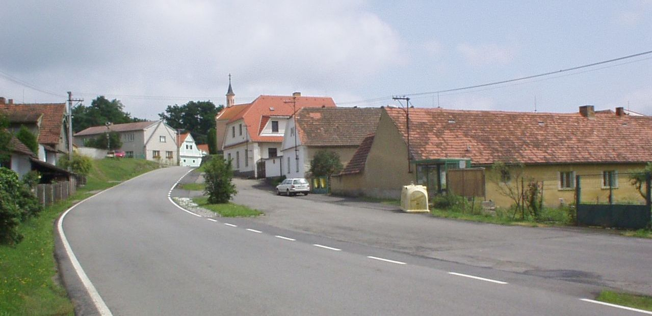 náves ve Skaličanech